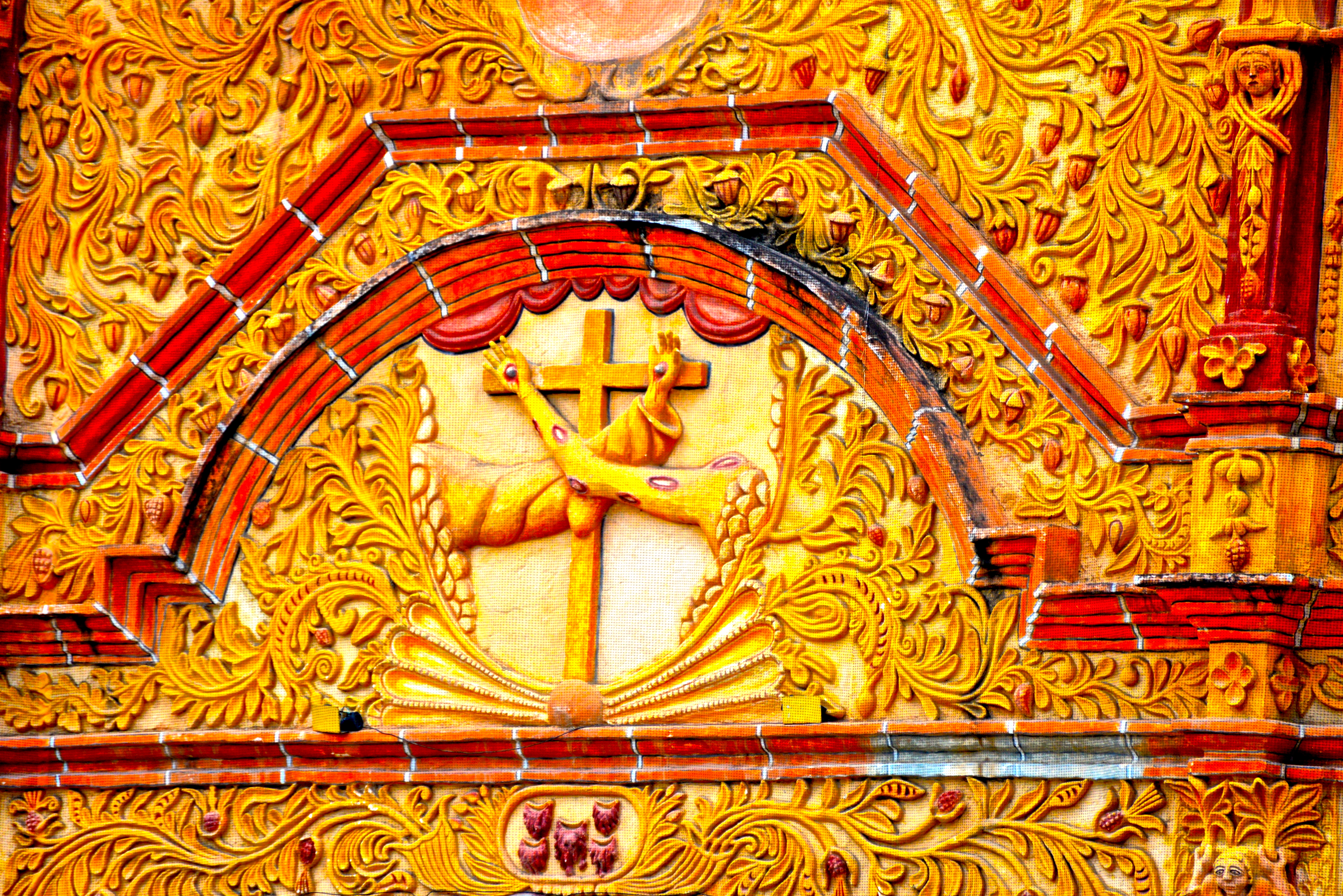 Ornamente de la pared frontal de la Misión de Santiago de Jalpan, la primera de las misiones franciscanas de la Sierra Gorda de Querétaro.